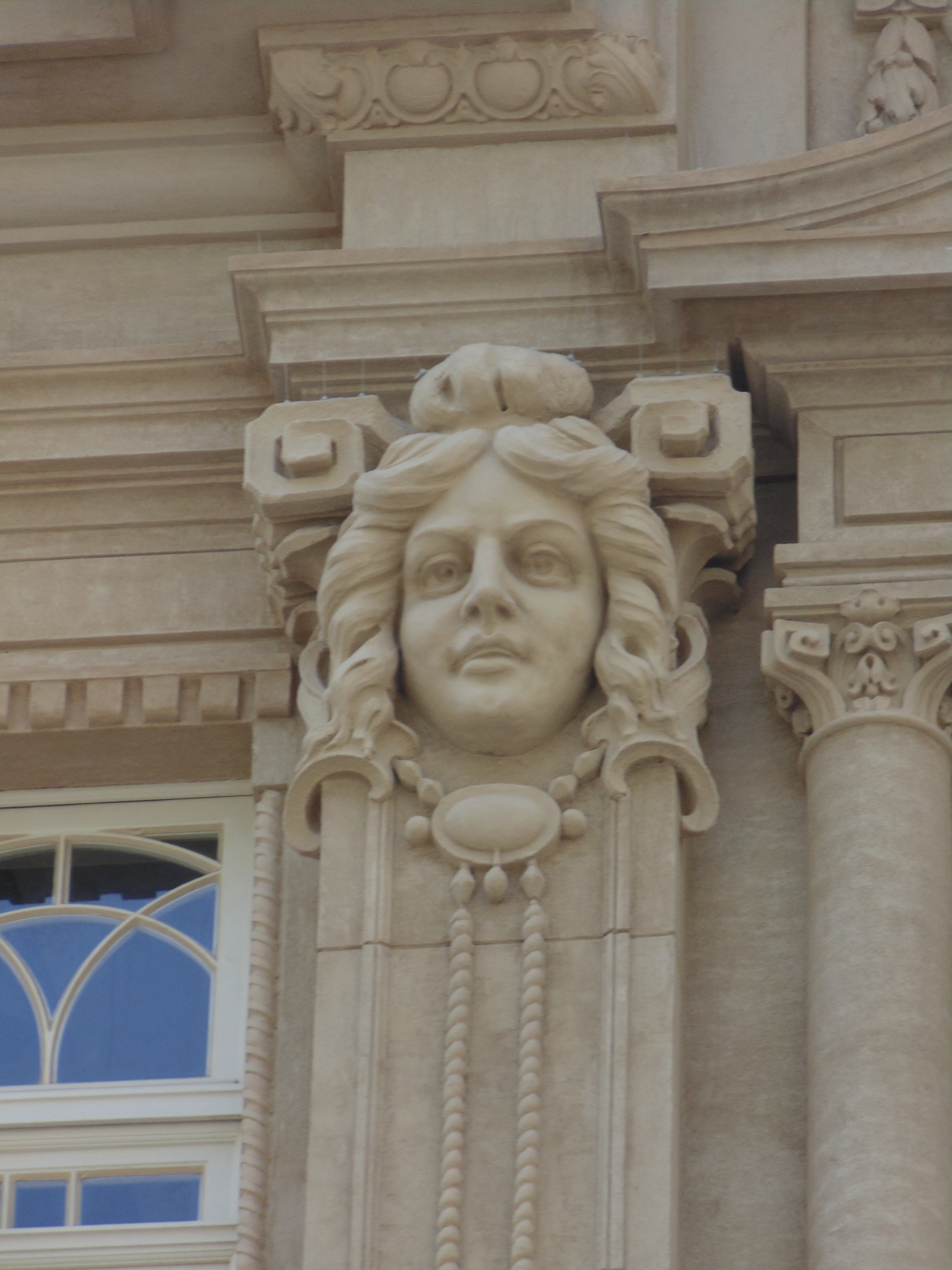 Escultura do Palacete Tereza Toledo Lara, em São Paulo (SP), Brasil